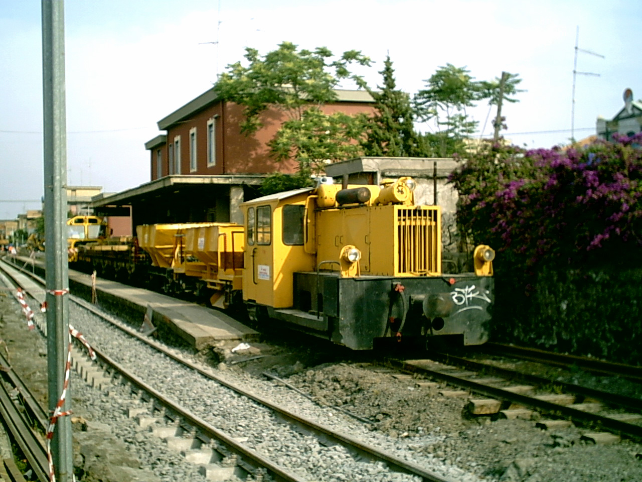 Foto di una locomotiva